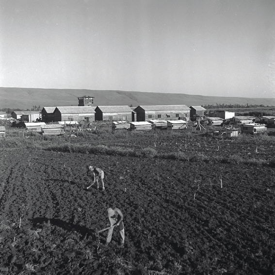 בית הלל - מראה.